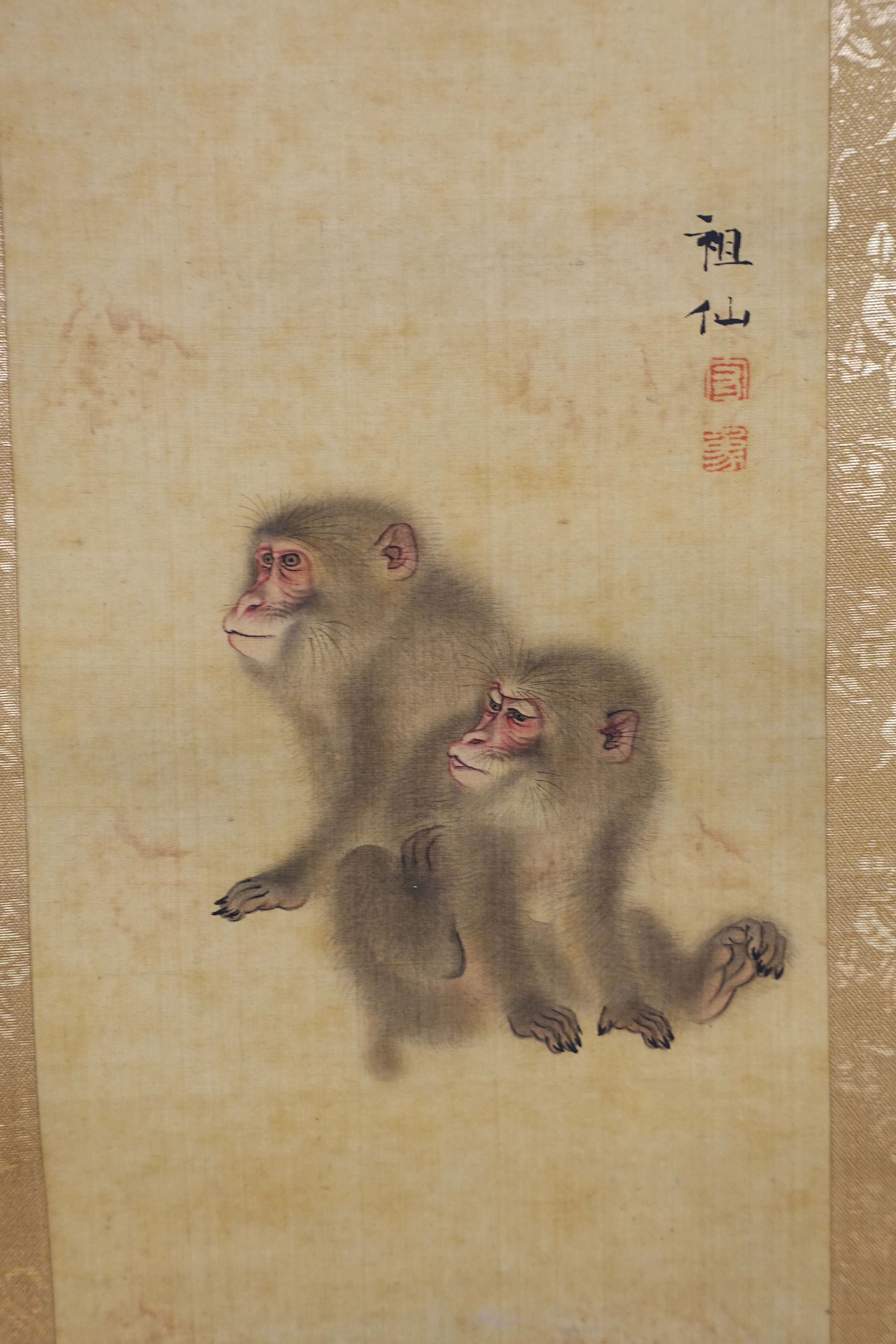 Japan; Hanging scroll; Paintings